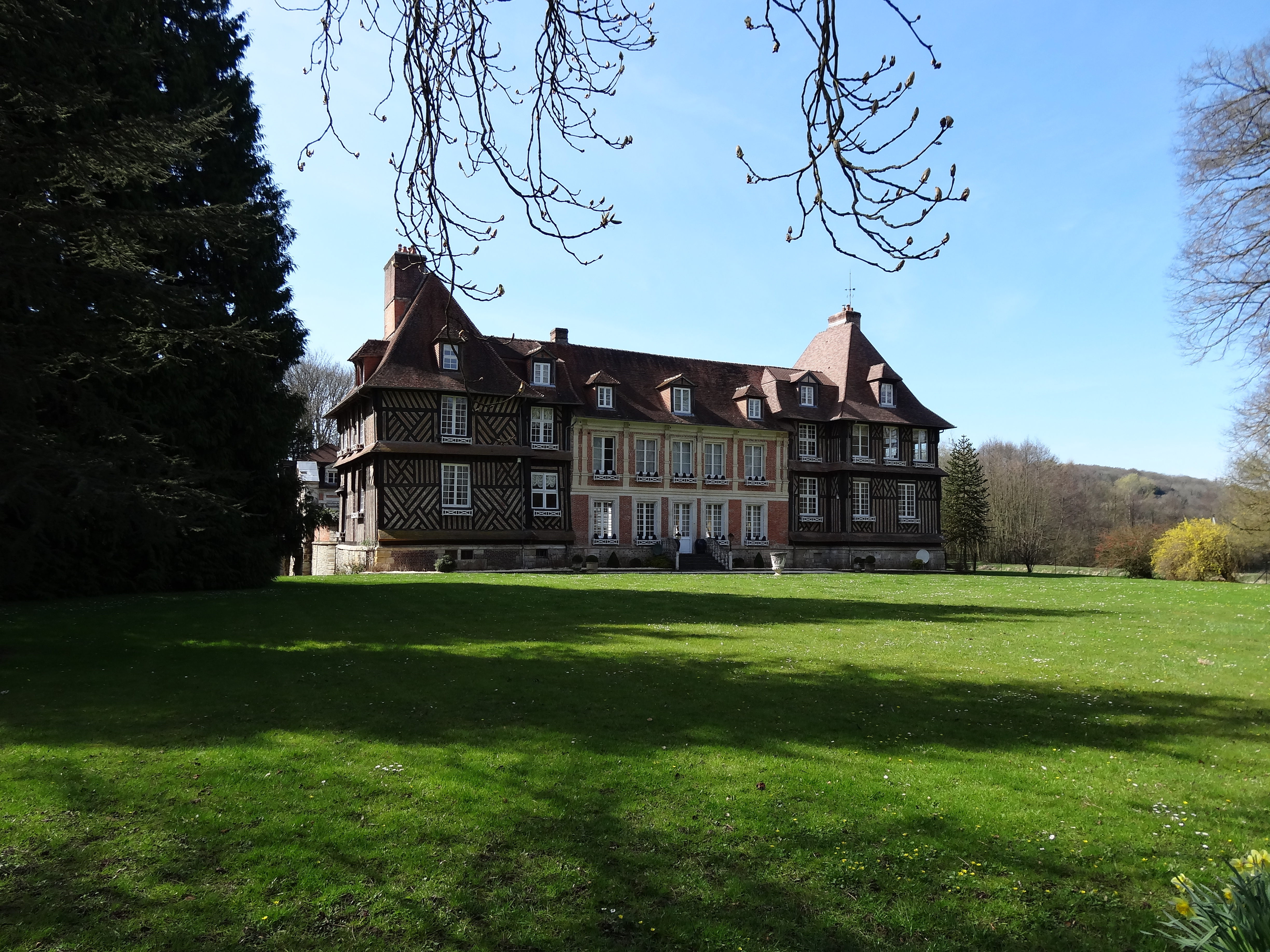 Château du Breuil, (Inscrit, 1933) façade est du logis du château (XVIè et XVIIè siècles)